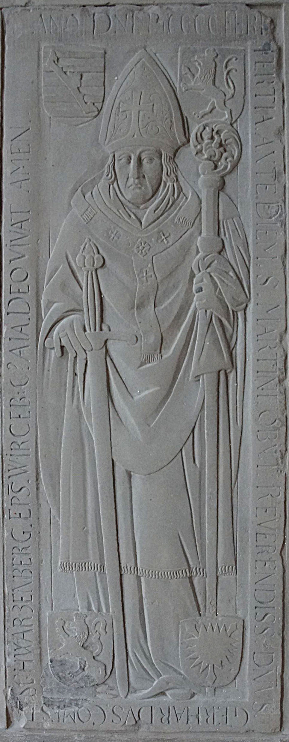 Grablege in der Marienkirche in der Festung Marienburg in Würzburg Sigismund von Sachsen (1440-1443)